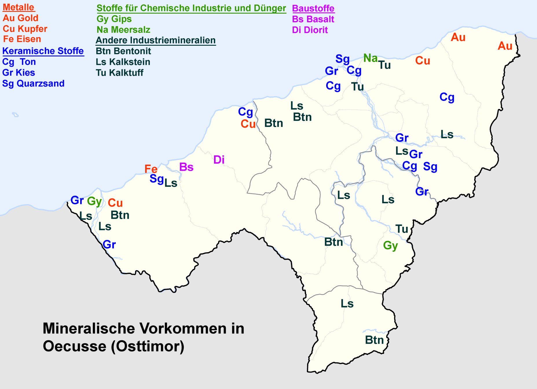 Mineralische Vorkommen in Oecusse (Osttimor). Informationen aus: United Nations, Economic and Social Commission for Asia and the Pacific: Atlas of Mineral Resources of the ESCAP Region: Geology and Mineral Resources of Timor-Leste (PDF)